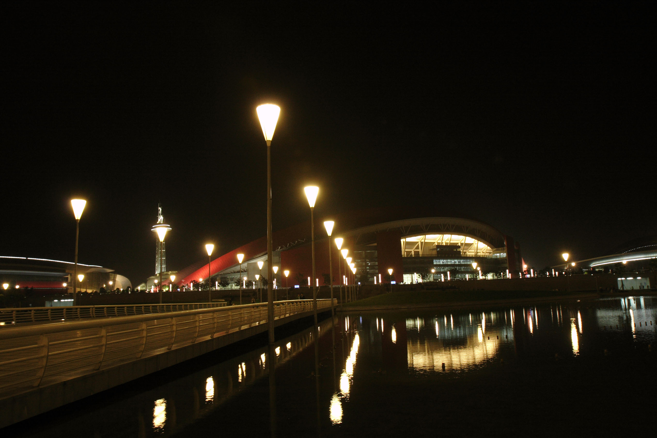 南京奥体中心夜景